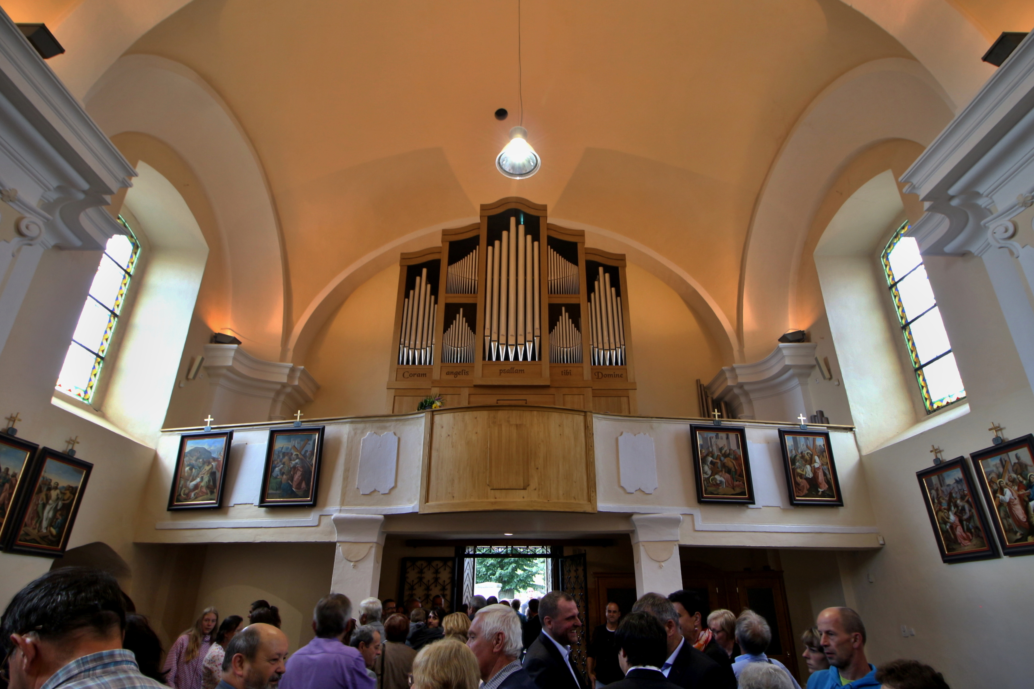 Interiér kostela sv. Prokopa v Chyškách